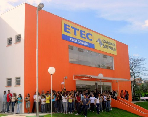 ETEC Poá - Poá-SP